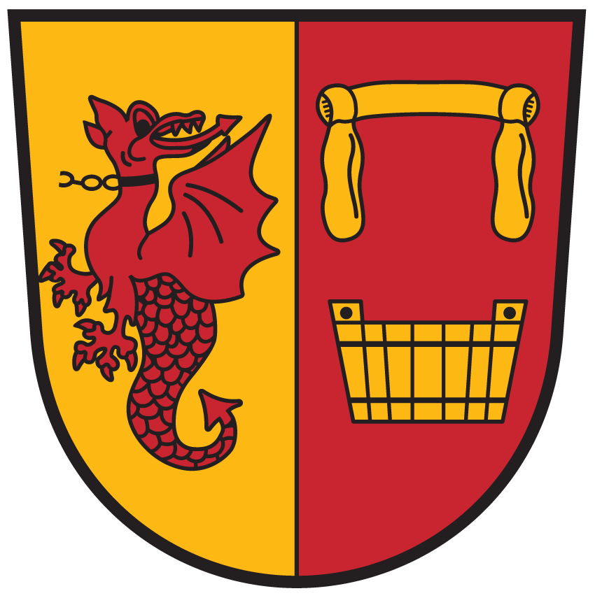 Wappen von St. Margareten im Rosental